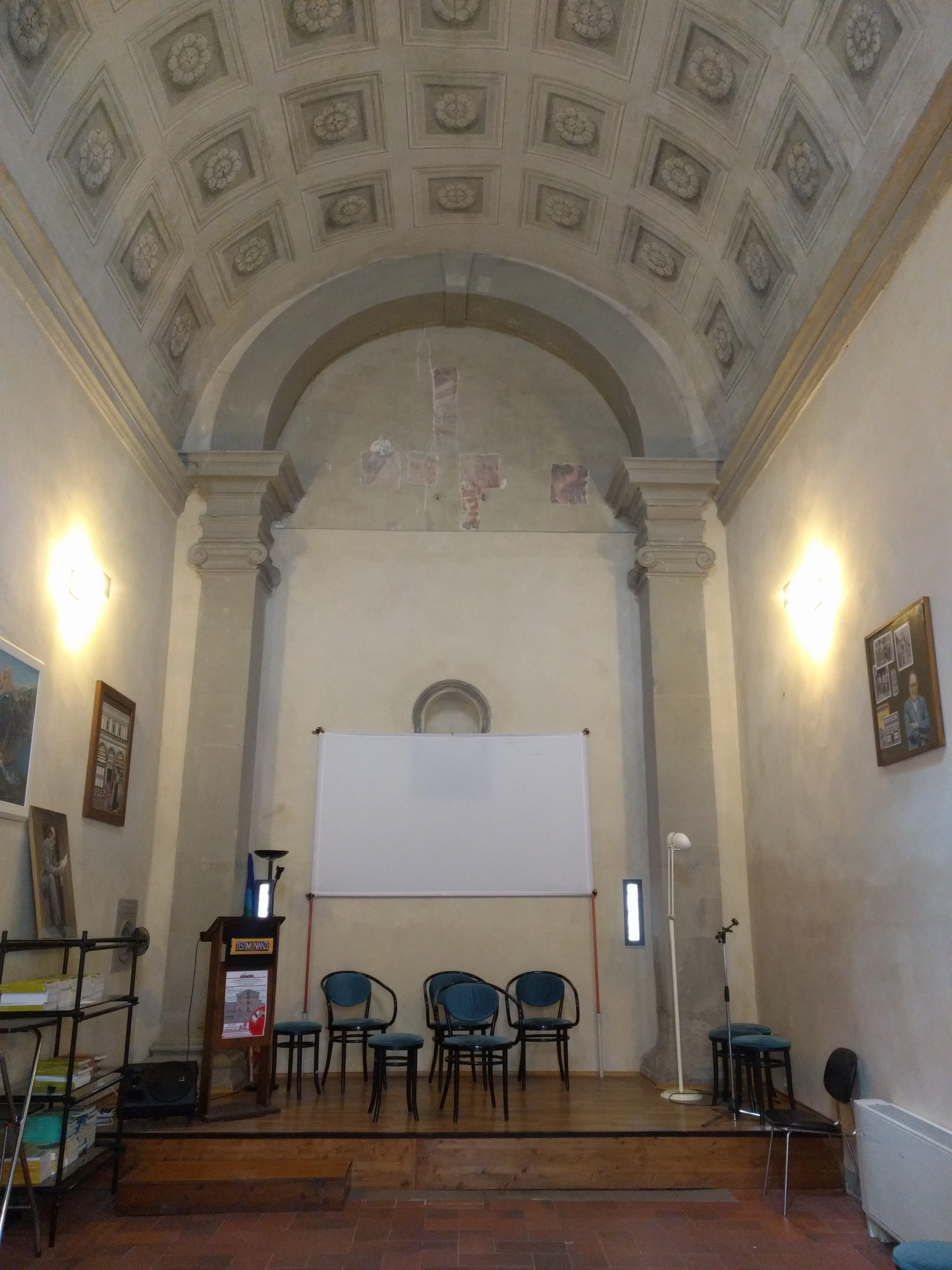 interno della Cappella Santa Maria della Neve nel corso Le Murate, Firenze